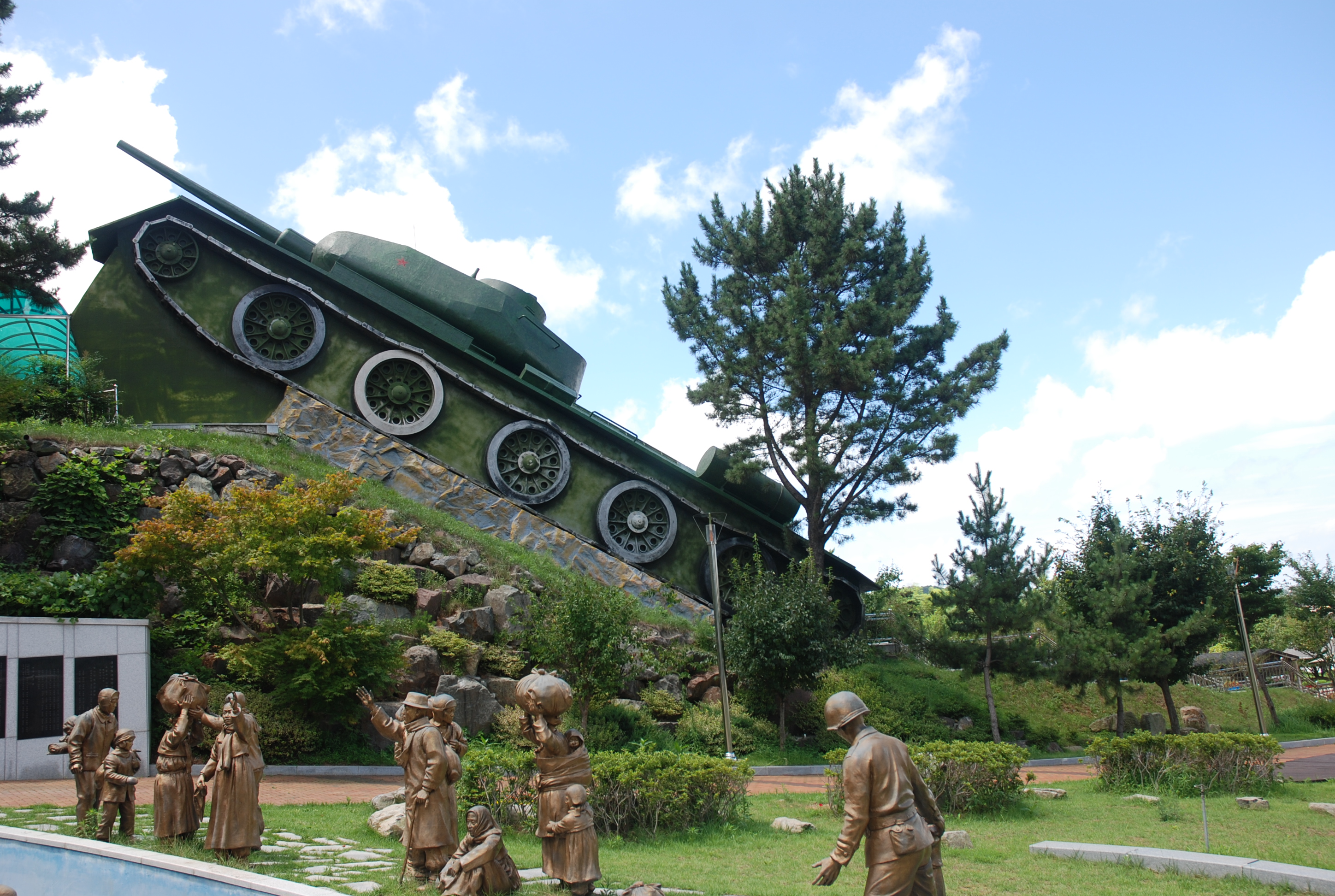 Geoje POW Camp Entrance Gate